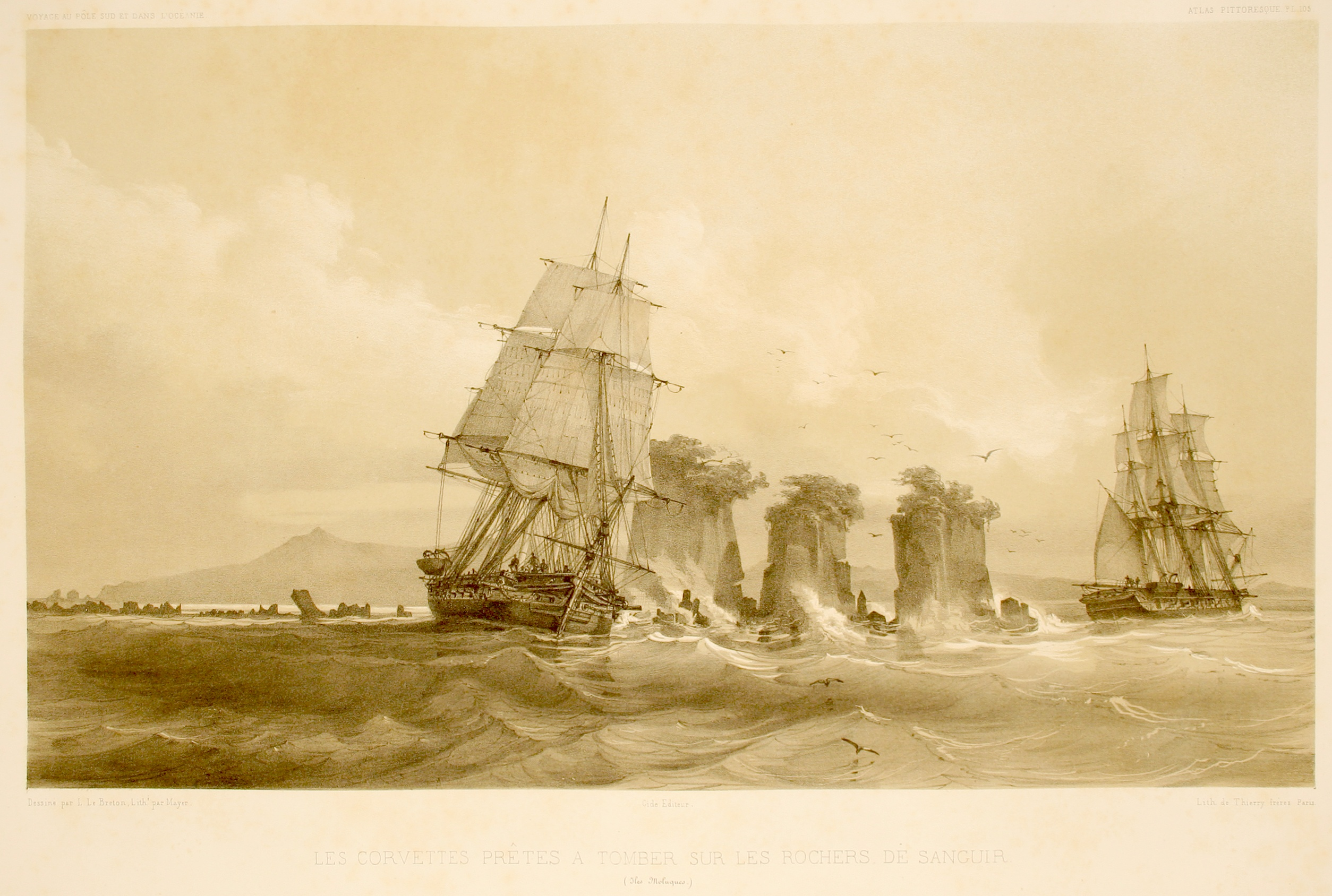 Les corvettes sur les rochers de l'île Sanguir. Atlas pittoresque, planche 105